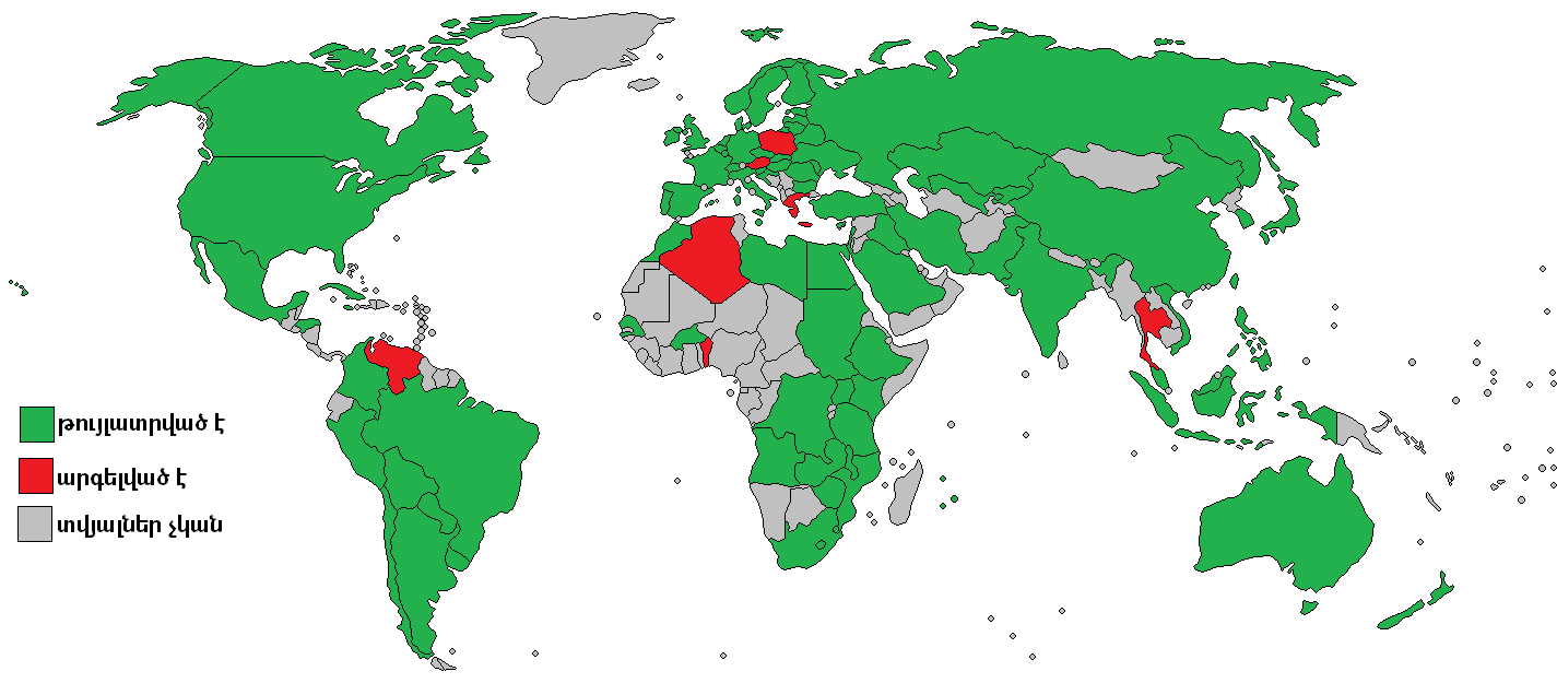 Կանաչով նշված են այն երկրները, որտեղ թուլյատրված է ԳՁՕ-ի օգտագործումը, կարմիրով այն երկրները, որտեղ արգելված է, իսկ դարձնագույնով նշված երկրների վերաբերյալ տվյալները բացակայում են